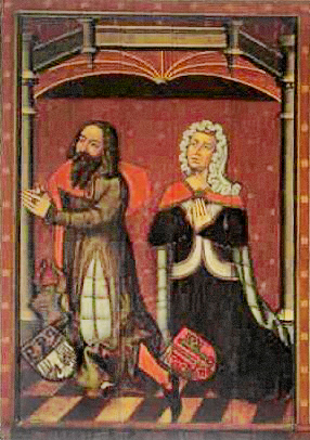 Als Tafelbild des Lübecker Ratsherrn Johann Crispin (d. 1442) und seiner Ehefrau Taleke Kerkring falsch beschrieben, richtig der Lübecker Bürgermeister Segebodo Crispin gestorben 1332 mit seiner ersten Ehefrau, einer geborenen Güstrow, identifizierbar durch ihr Familienwappen.